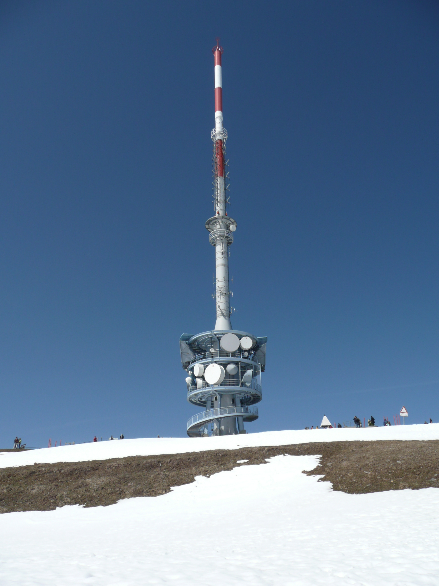 Sendeanlage der Swisscom Broadcast AG auf Rigi-Kulm